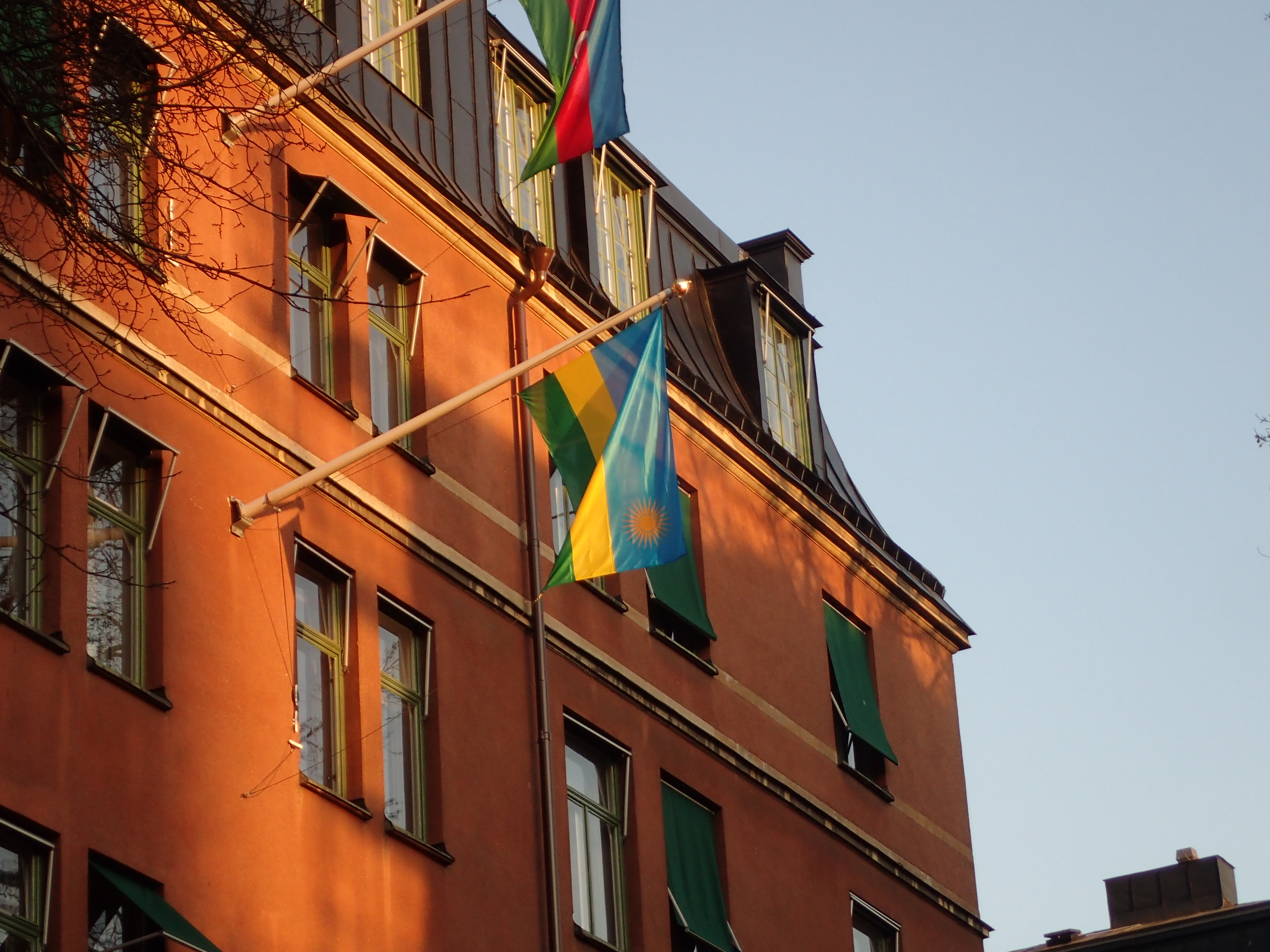 Embassy of Rwanda. Barnhusgatan 3, Stockholm, Sweden.